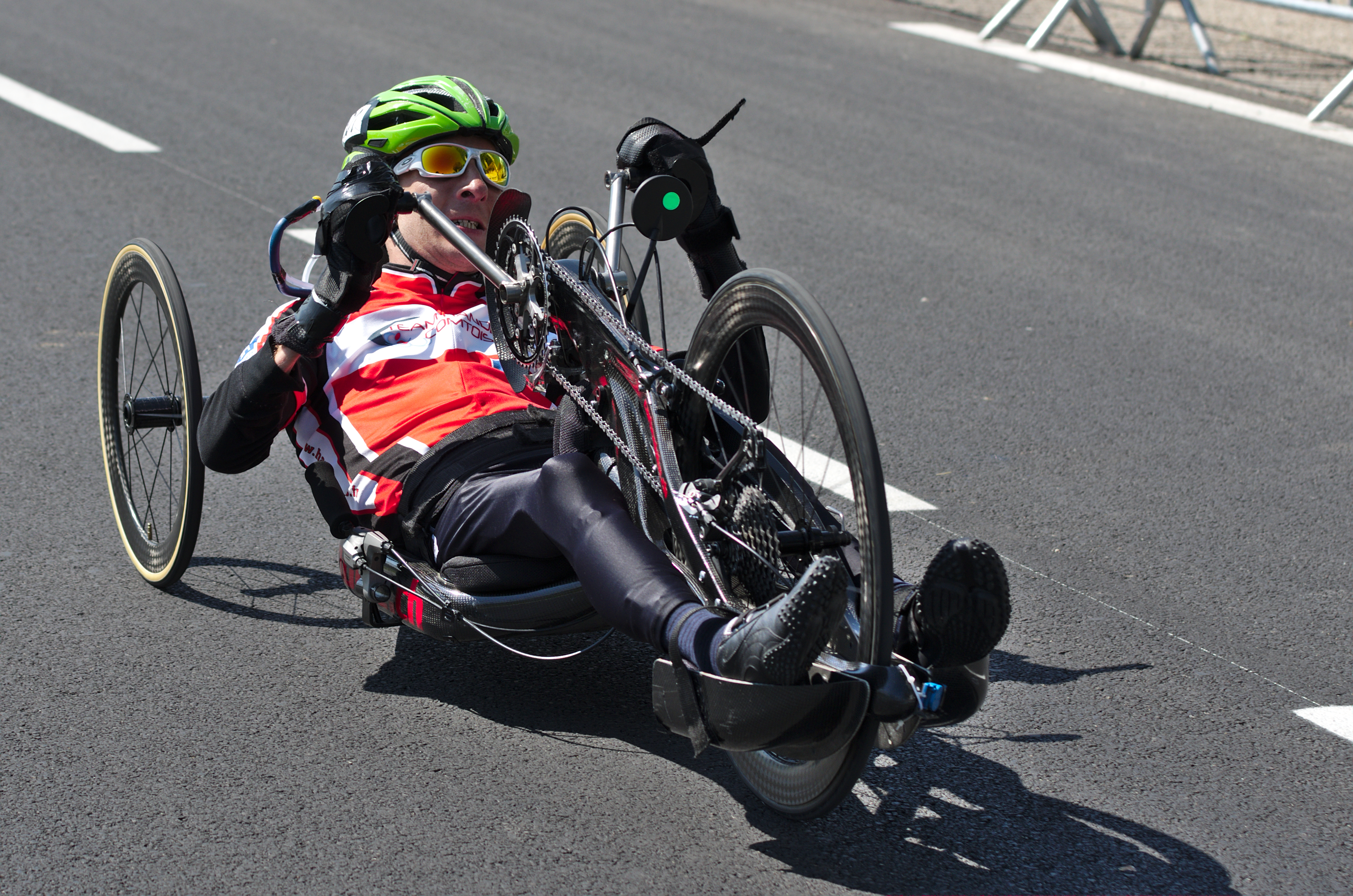 Championnat de France de cyclisme handisport - 20140615 - Contre la montre